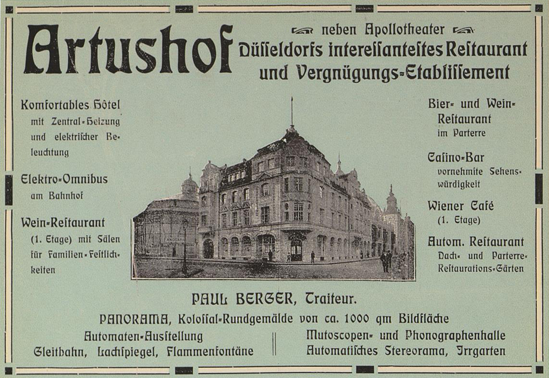 Hotelrestaurant "Artushof", befand sich an der heutigen Ecke Adersstraße 21 zur Jahnstraße, Düsseldorf, Anzeige von 1905. Erbaut in 1904 war ein Top-Hotel für die Varieté-High-Society des Apollo-Theaters nebenan. Um 1910 wurde das Hotel gänzlich aufgegeben und darin ein "Kleines Haus für Schauspiele" eingerichtet. Von kleineren baulichen Änderungen abgesehen, blieb das Haus bis zur Zerstörung im 2. Weltkrieg in seinem Zustand unverändert und diente als Operettenhaus, gelegentlich auch als Lichtspieltheater.